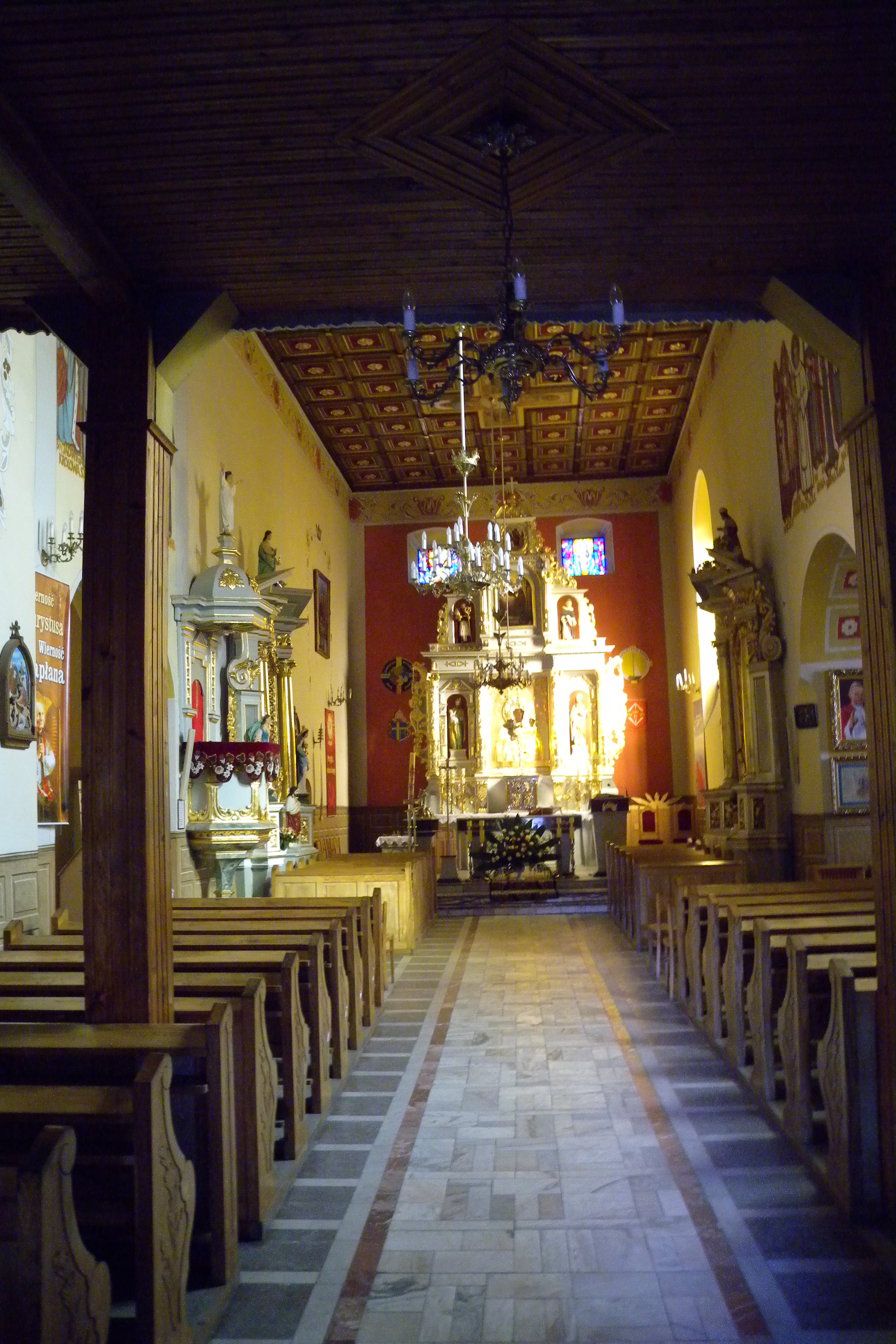 Buczek Kościół pw. św. Jana Chrzciciela